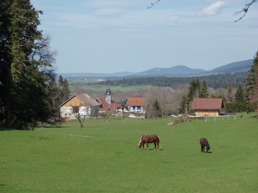 Passonfontaine